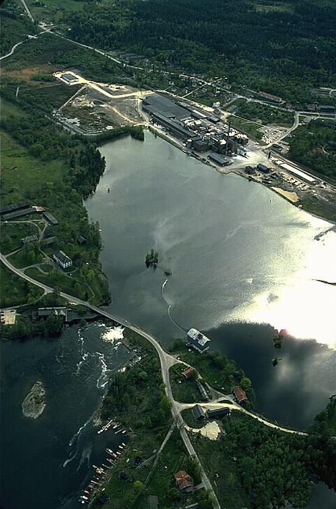 Åsensbruk i Dalsland. Bilden troligen från omkring 1980.